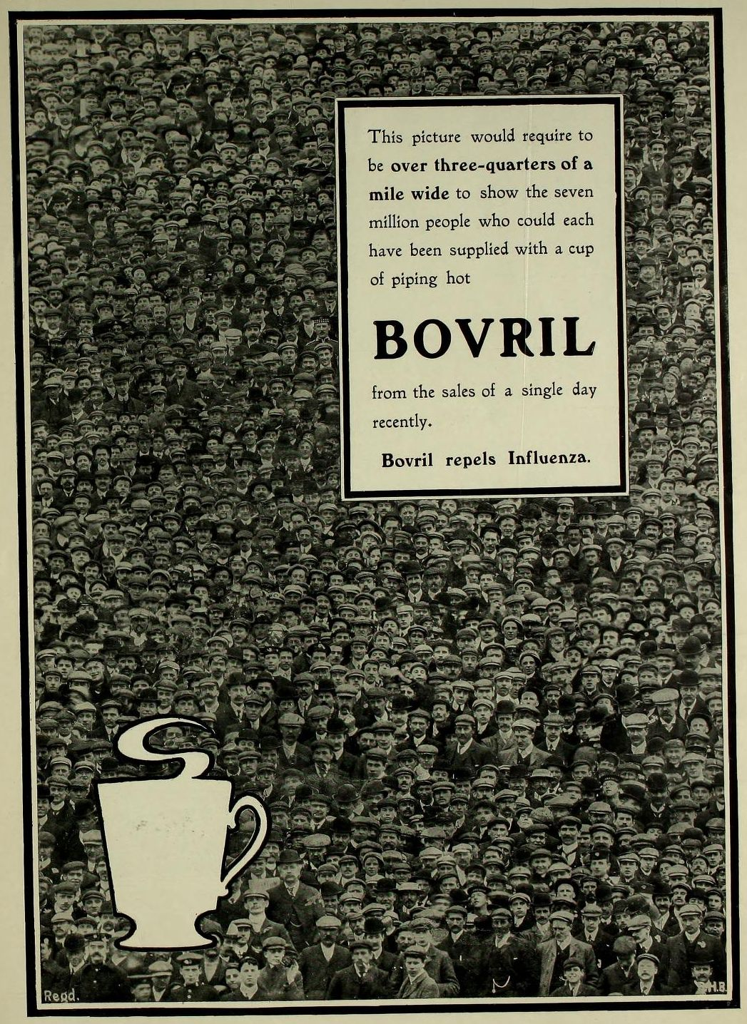 Advertisement for Bovril